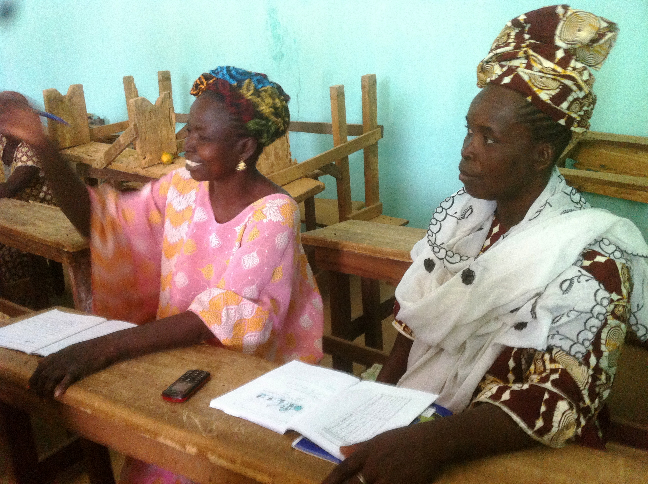 "On est vieux Jamais versez Apprendre, Chaque Jour oreille va à l'école"